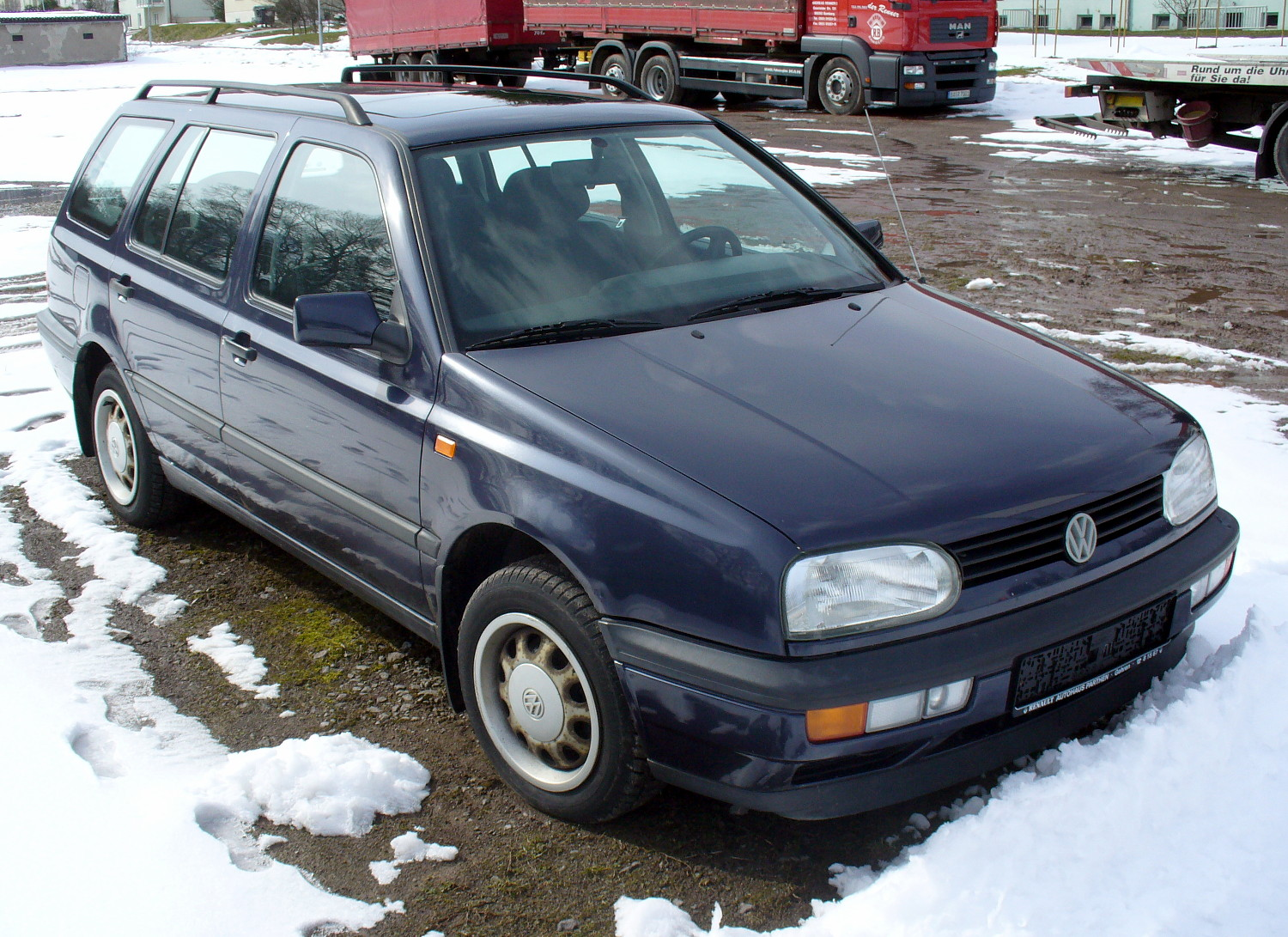 VW Golf III Variant